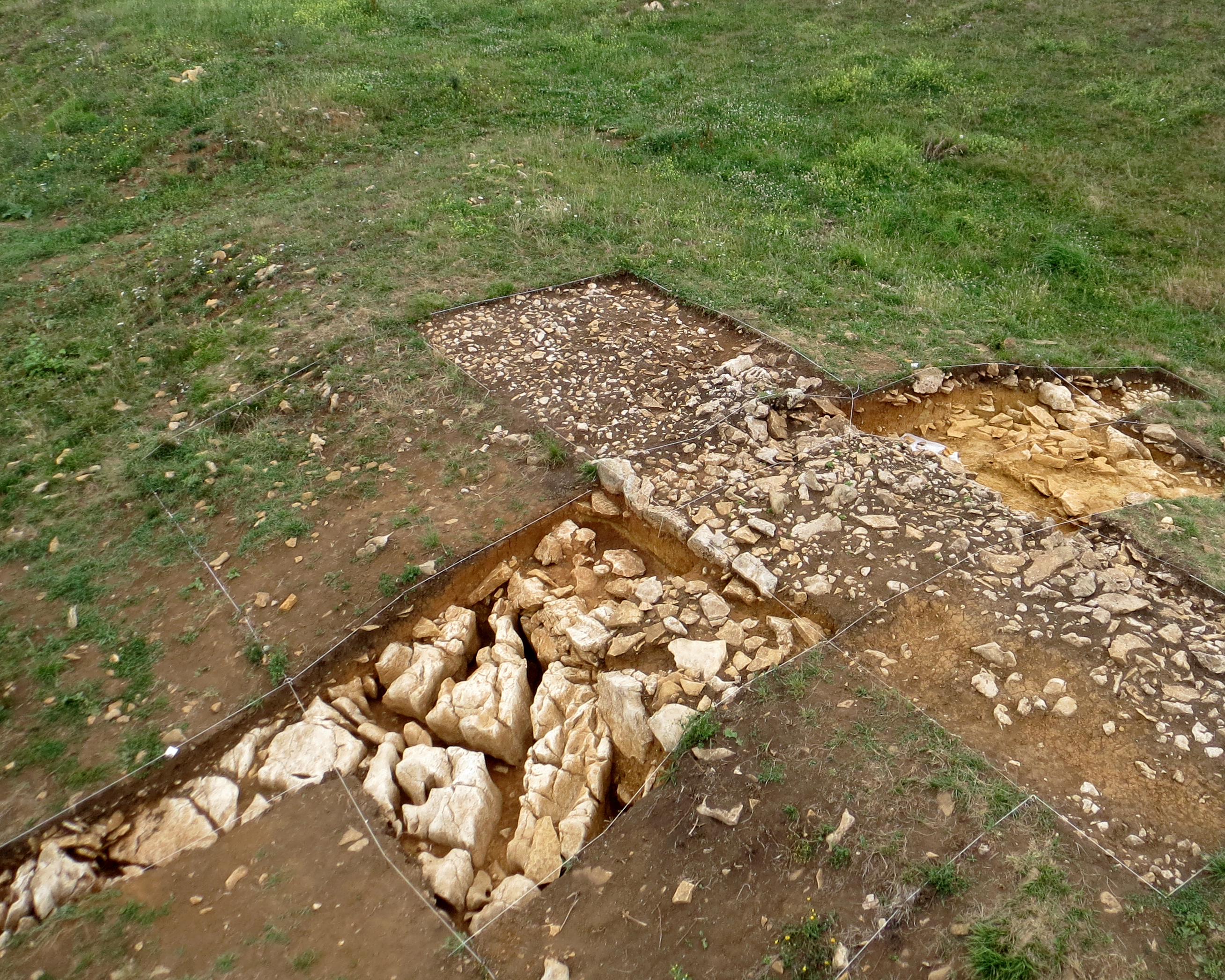 Vista general del sondeo 2 del Castro de El Cincho, Yuso (Santillana del Mar). Muralla principal y superposiciones murarias.